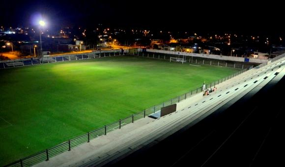 Foto del Estadio Juventud